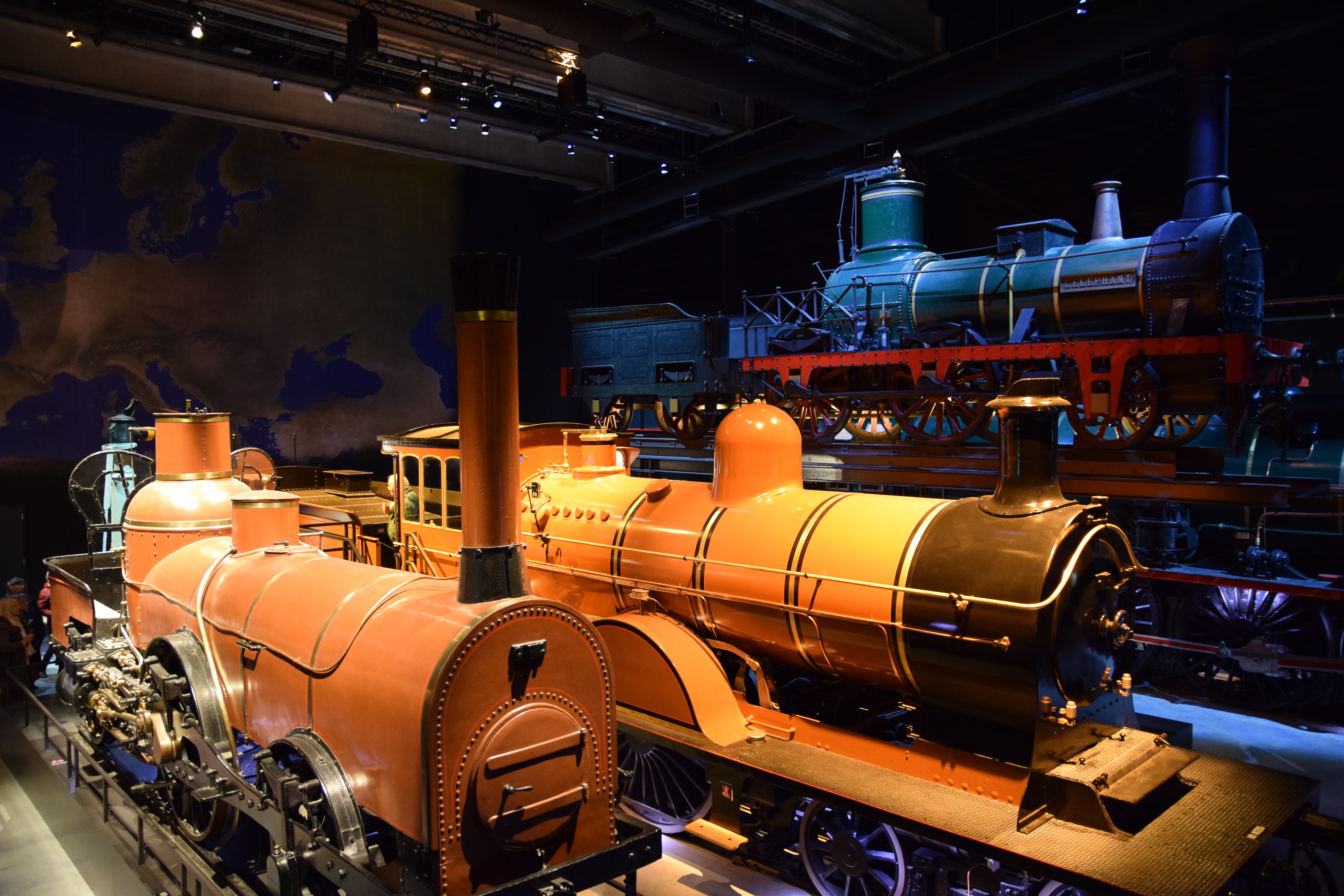 Stoomlocomotieven in Train World